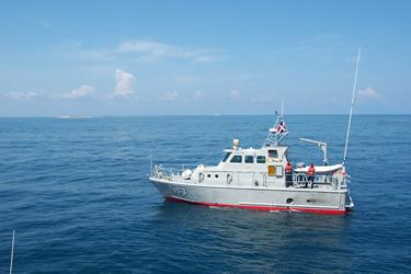 Lancha de Rescate Deneb (LR-153)